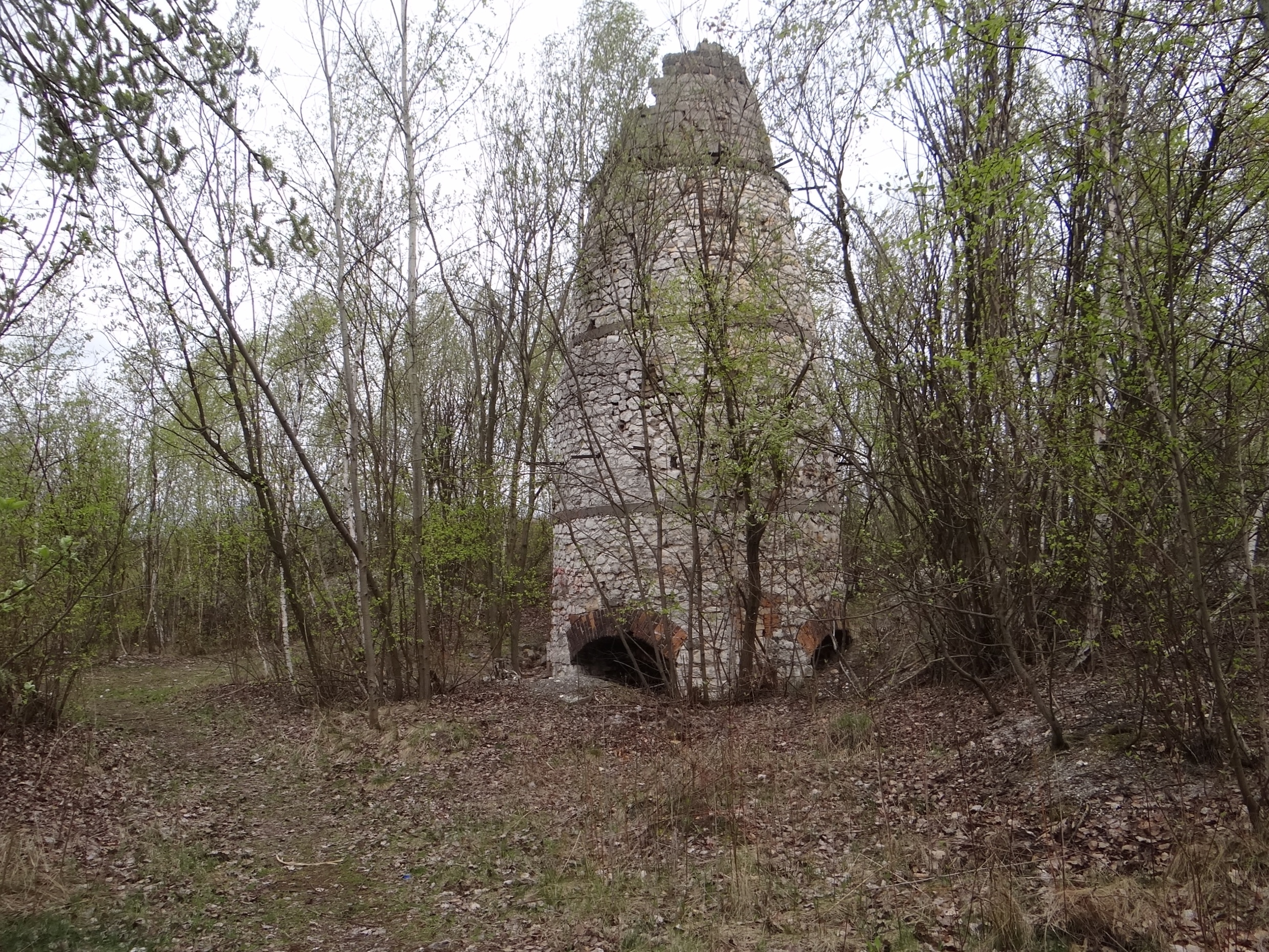 Bogucianka